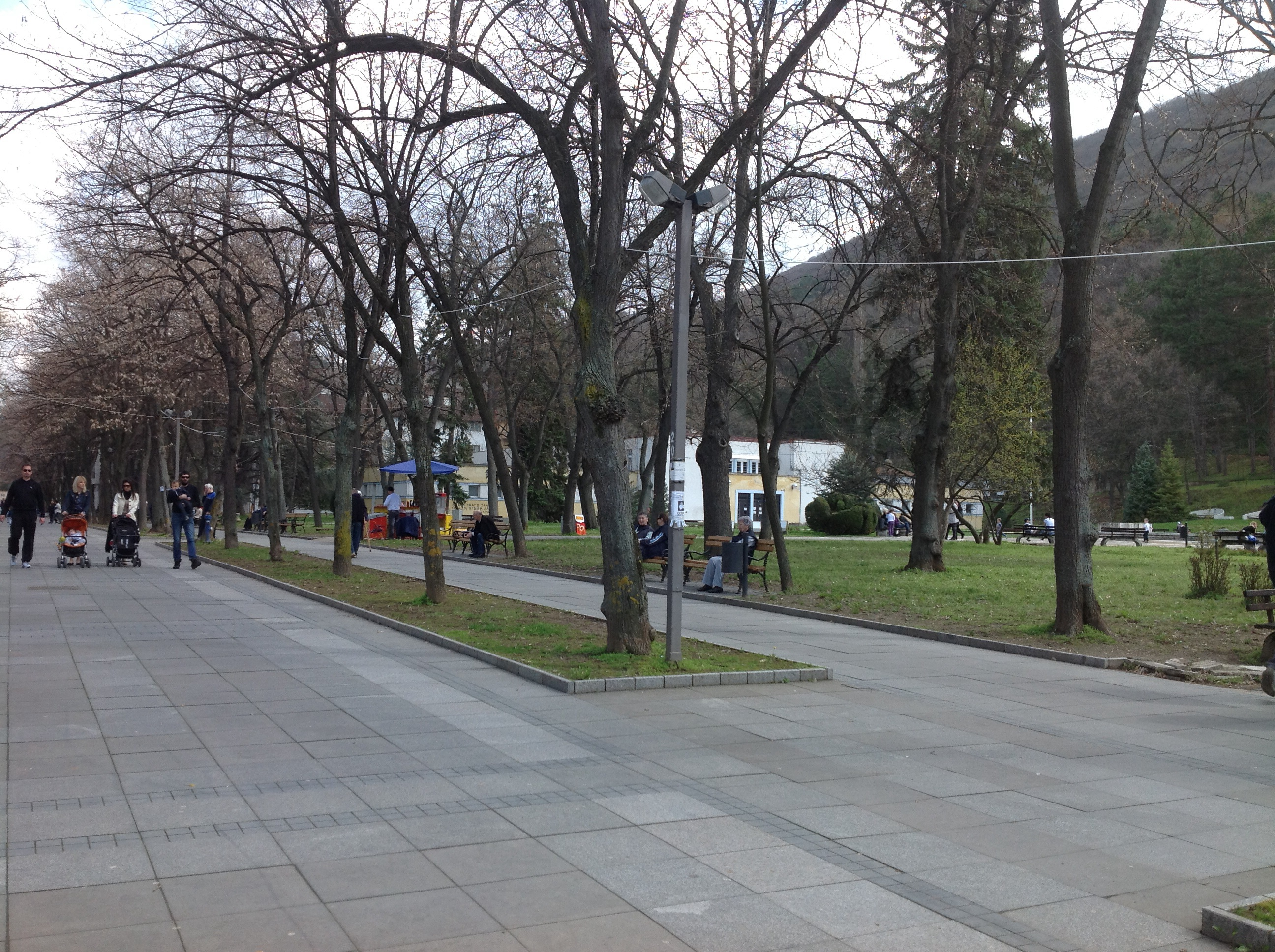 Српски (ћирилица): Централни парк са купатилом у Нишкој Бањи Аутор др Милорад Димић